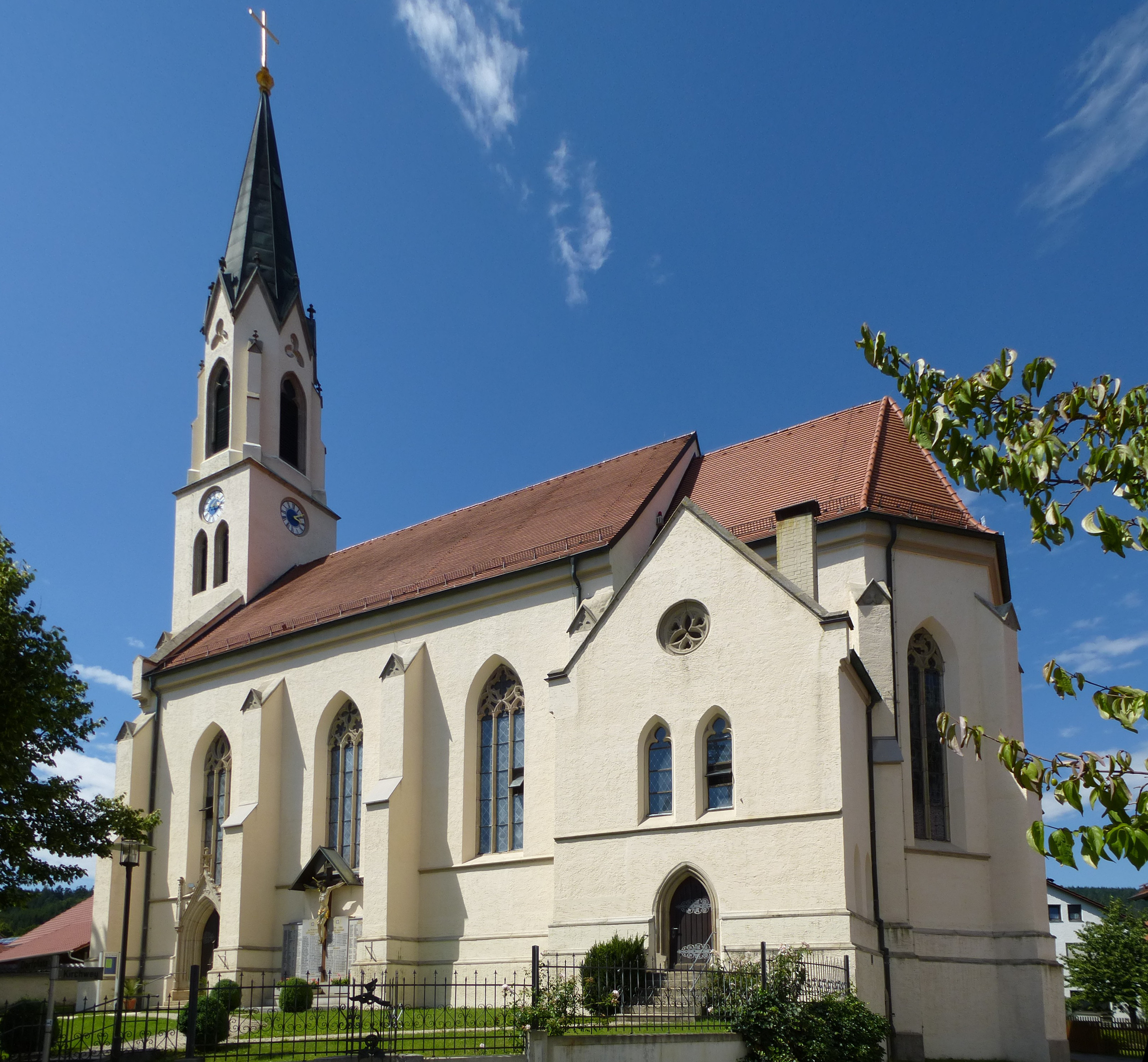 Kath. Expositurkirche St. Michael, Hofdorf bei Wörth a.d.Donau